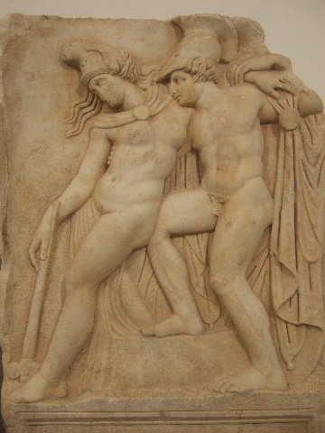 Aphrodisias (Museum): Penthesilea und Achilles